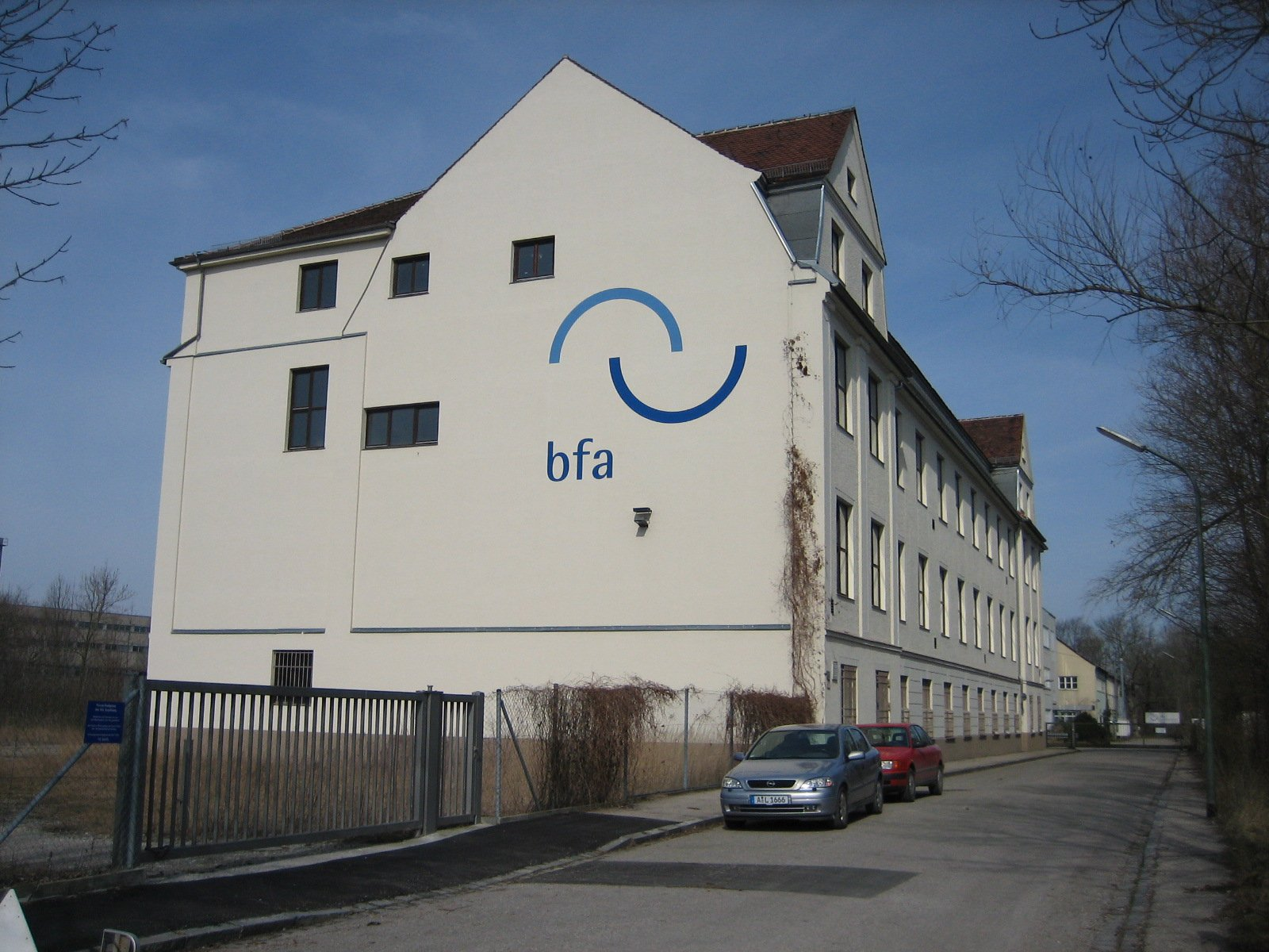 Augsburger Ballonfabrik an der Austraße mit Beschriftung der Nachfolgefirma "bfa See- und Luftausrüstung"